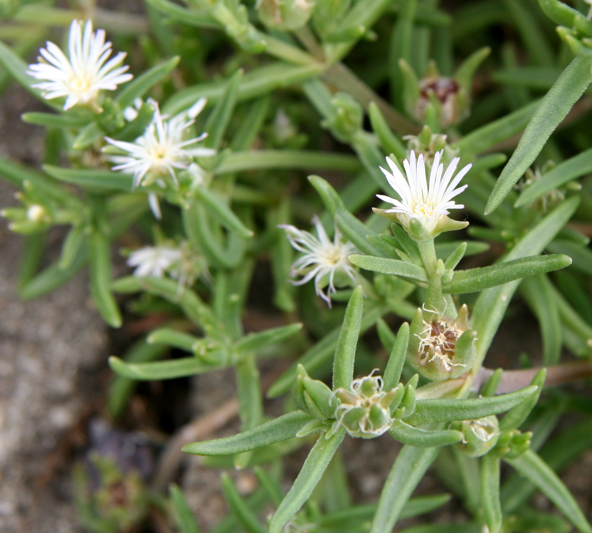 Delosperma mahonii im Botanischen Garten Dresden